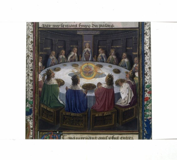 enluminure du XVe siècle ; ; Cote : BNF Richelieu Manuscrits Français 116 Lancelot du Lac, France, Ahun, XVe siècle, Évrard d'Espinques et collaborateurs Quête du saint Graal, France, Ahun, XVe siècle, Évrard d'Espinques et collaborateurs Tristan de Léonois, France, Ahun, XVe siècle, Évrard d'Espinques et collaborateurs Mort le roi Artu, France, Ahun, XVe siècle, Évrard d'Espinques et collaborateurs Marque de possession postérieure, France, XVe siècle Folio 610 verso pour les droits libres voir la page [1]